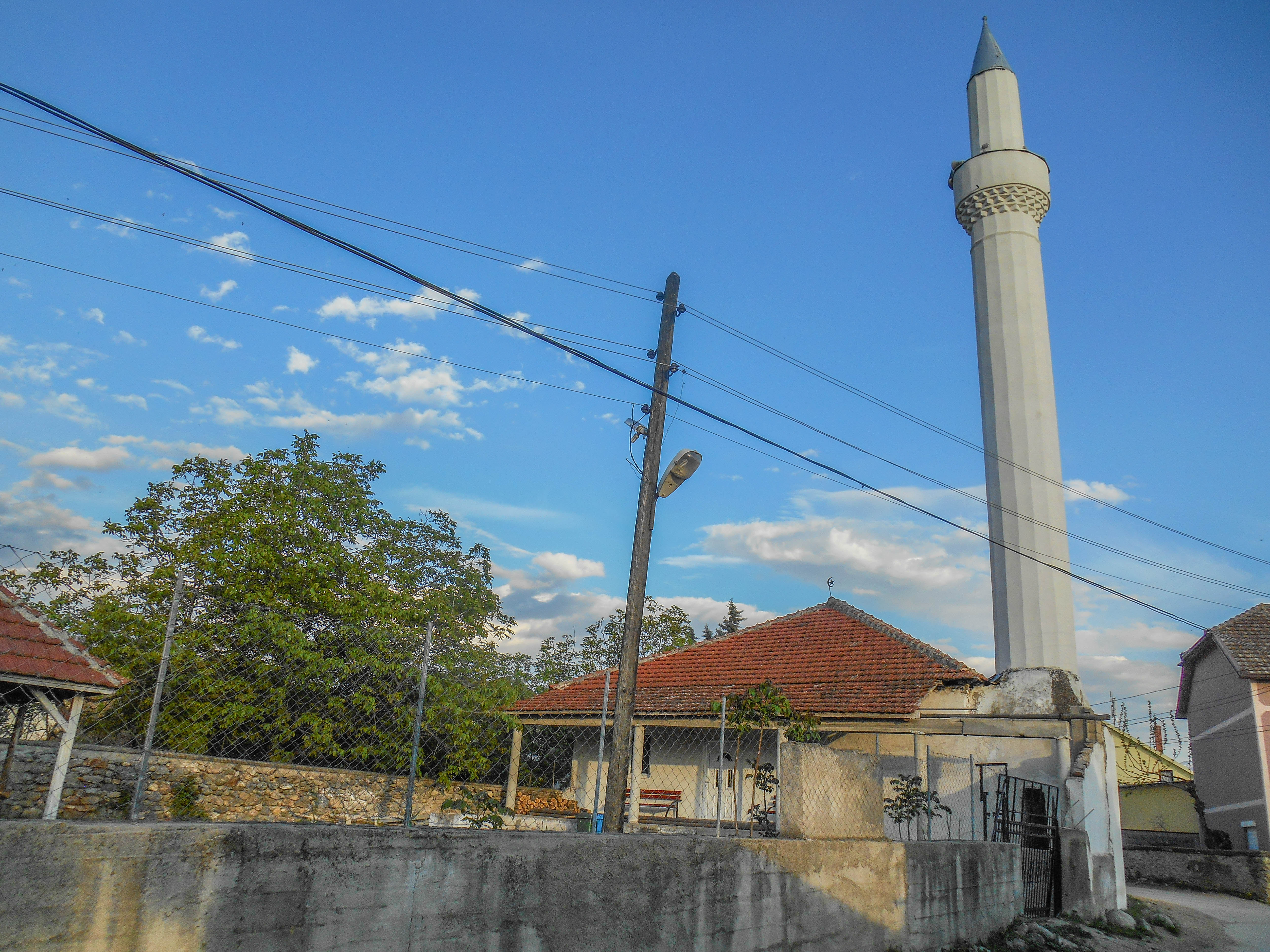 Џамија во Иловица